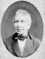 Burgemeester van Boom